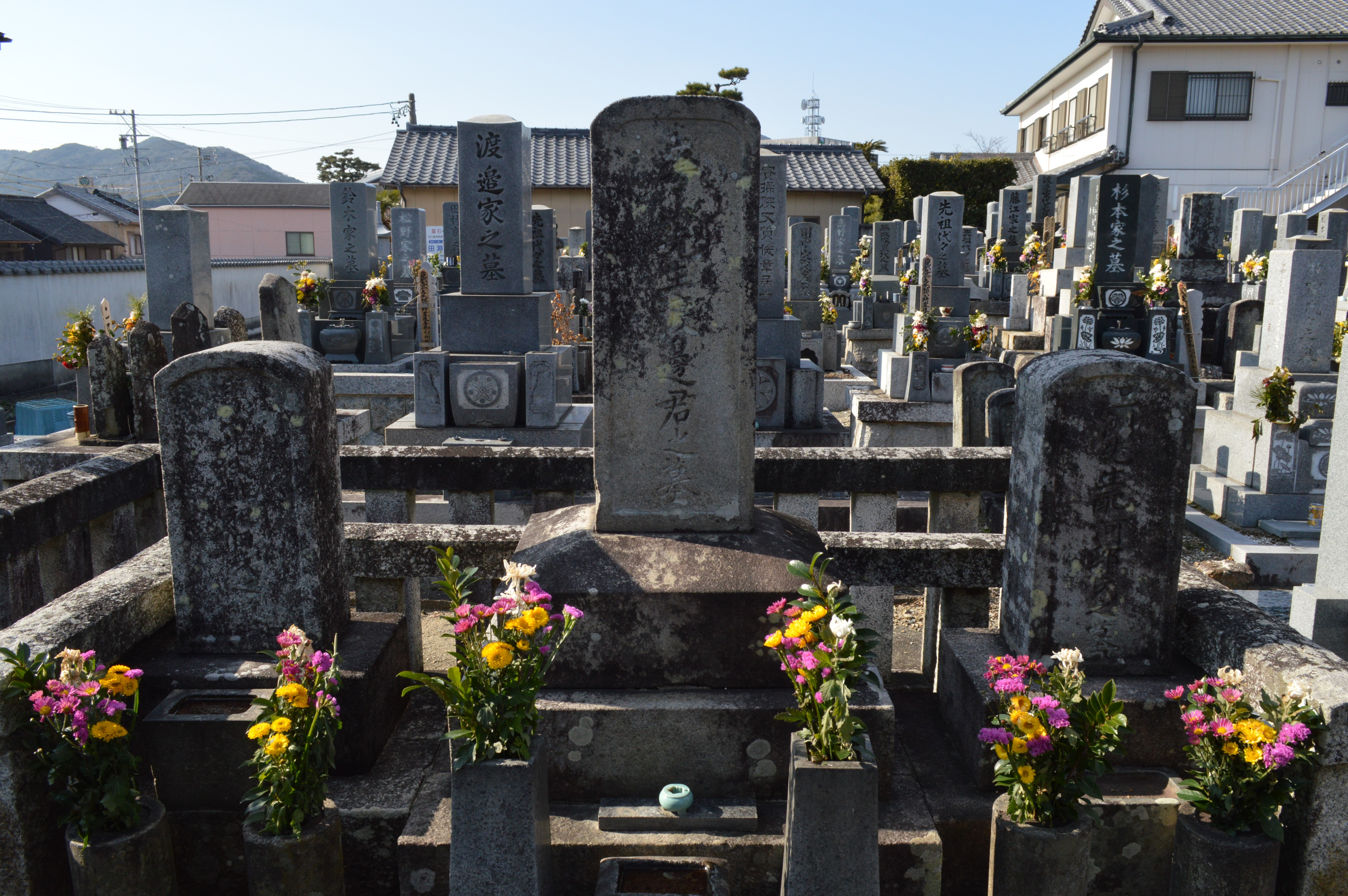 愛知県田原市 城宝寺。渡邊崋山の墓。